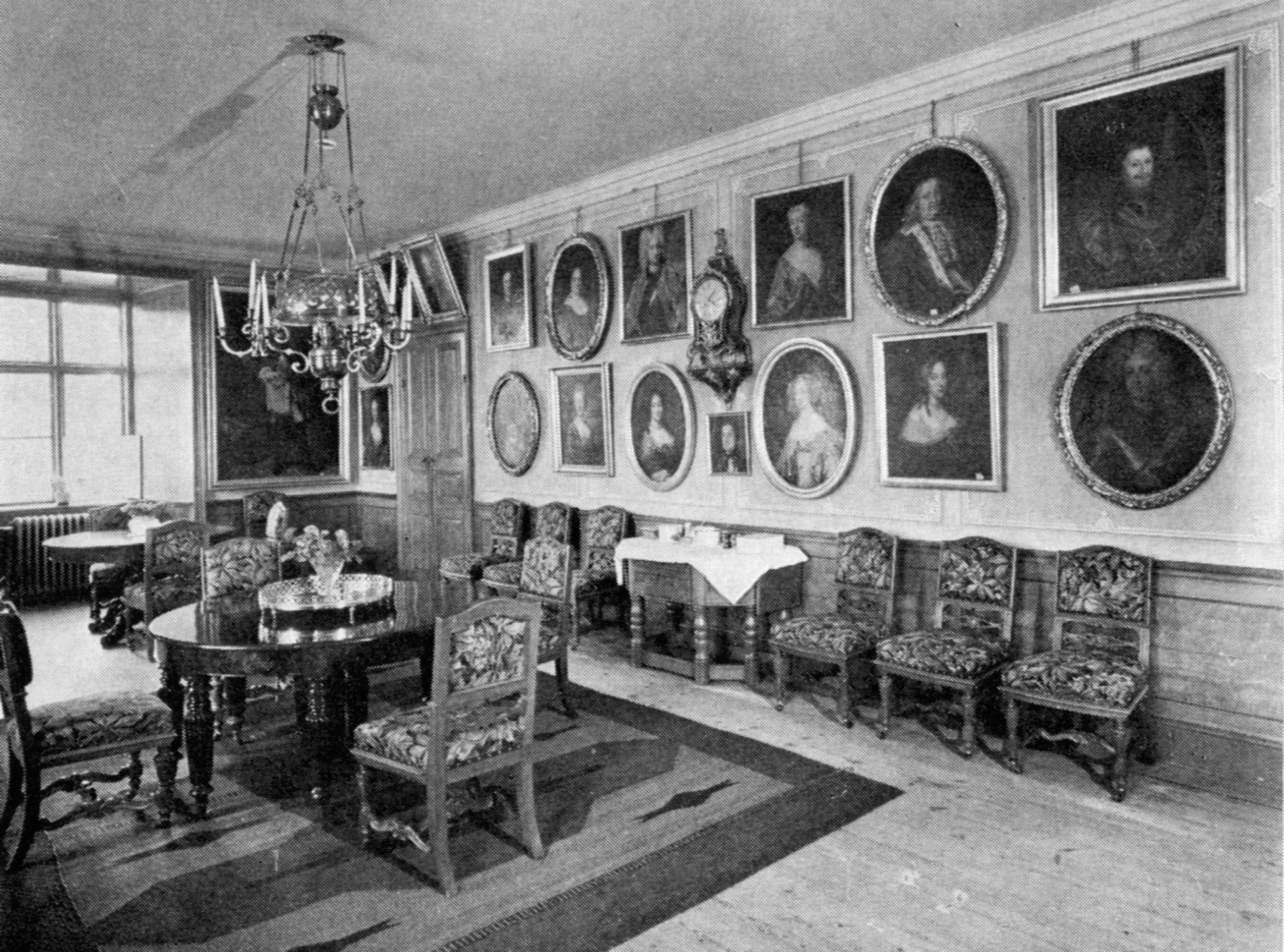 Vibyholm interiör, porträttsamlingen i matsalen